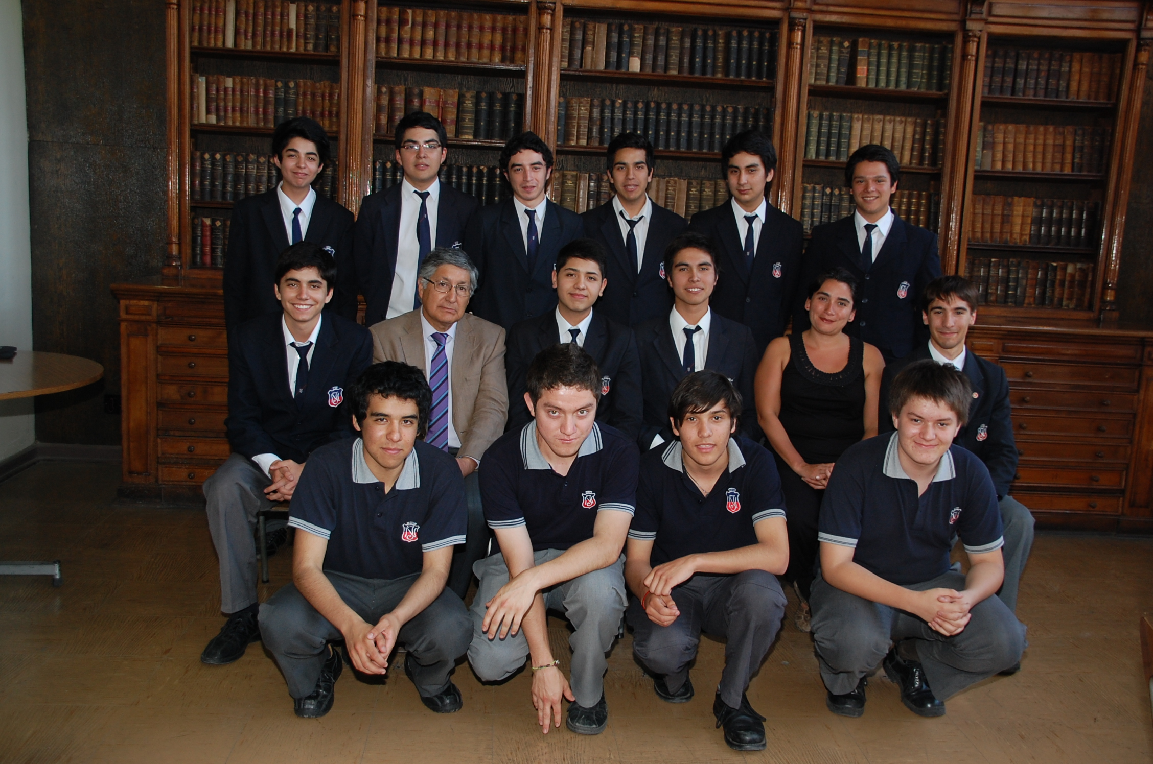 Directiva del Centro de Alumnos del Instituto Nacional periodo 2012.